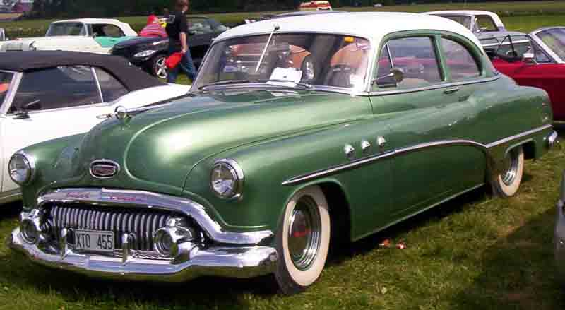 1951 Buick Special Deluxe Series 40 Model 48D Tourback